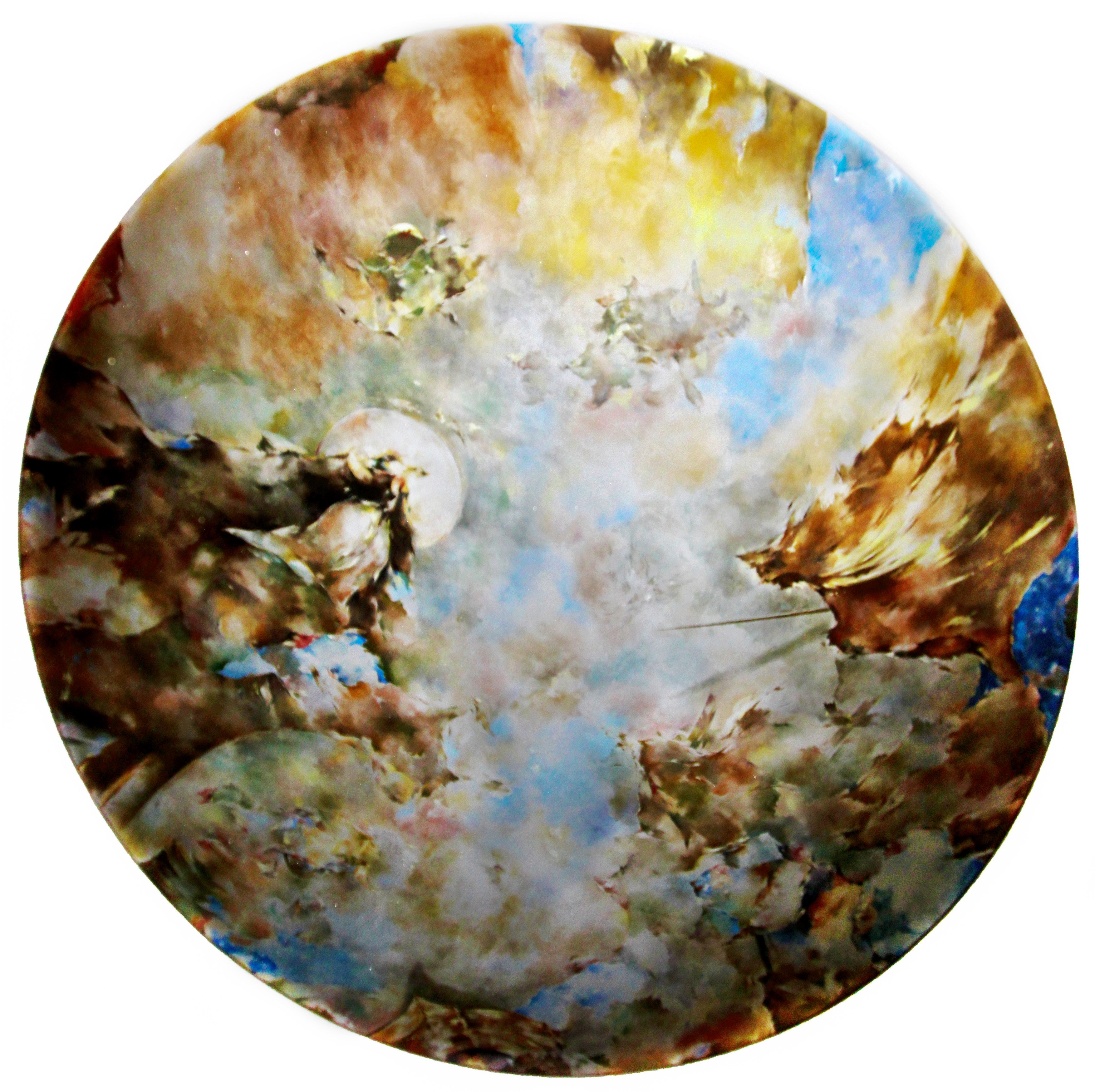 Fresco in der St. Joseph-Pfarrkirche in Paderborn-Marienloh, erstellt durch Maler Peter Schubert aus Berlin